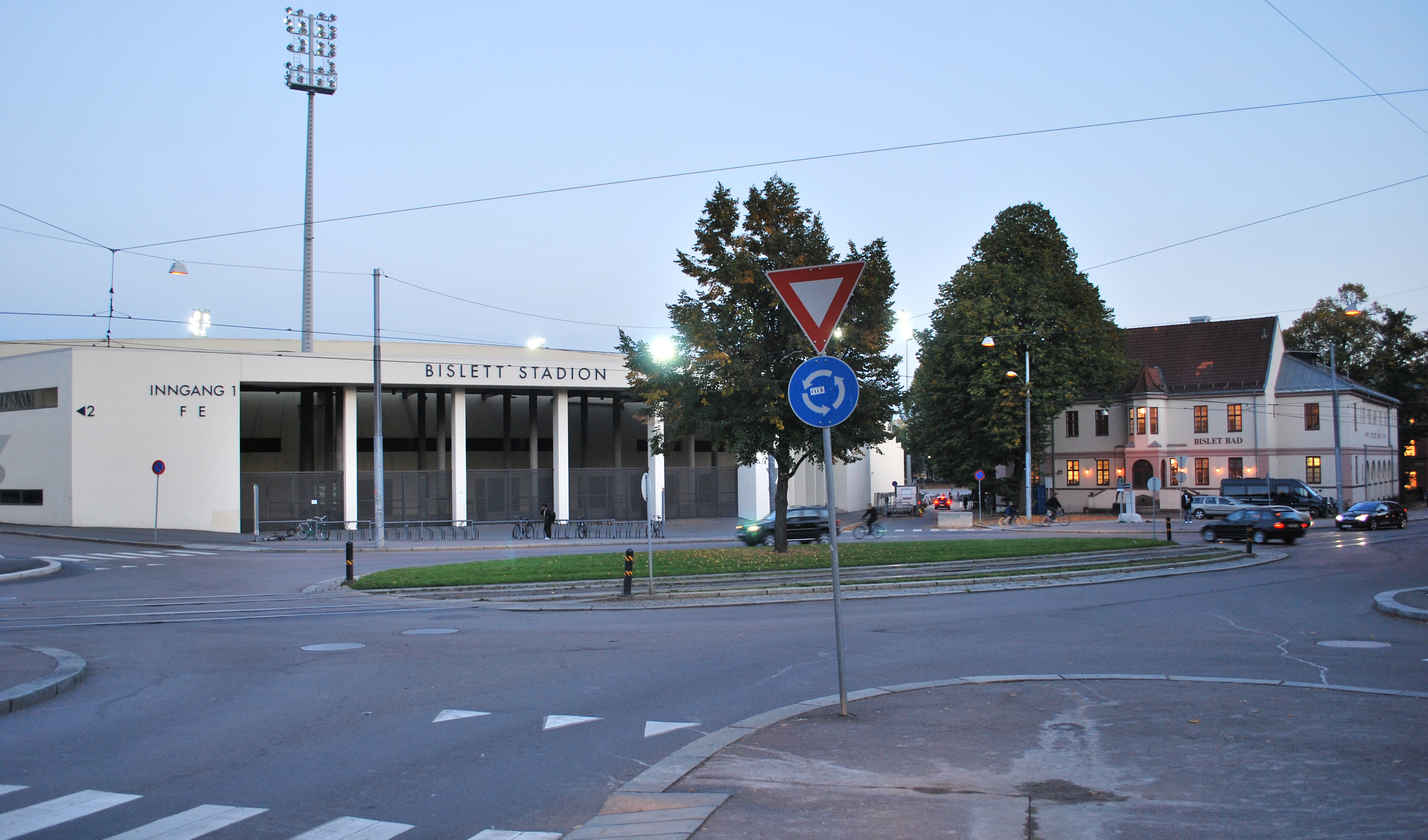 Bislett plass sett fra Thereses gate, med Bislett stadion og Bislett bad